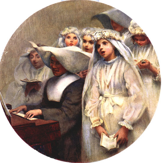 Obra do Projeto Eliseu Visconti